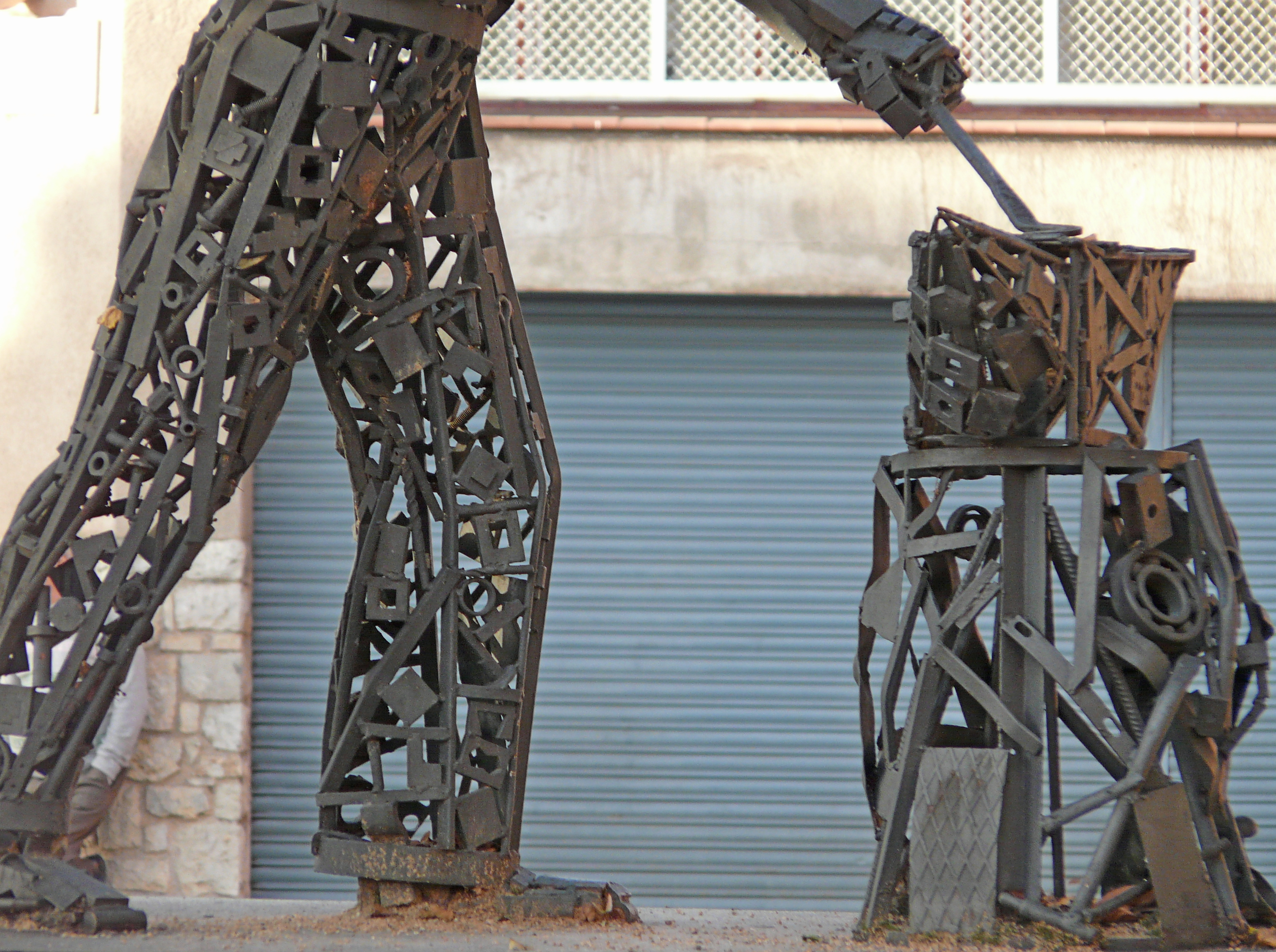 Detall de l'estàtua del Forjador, Castellar del Vallès